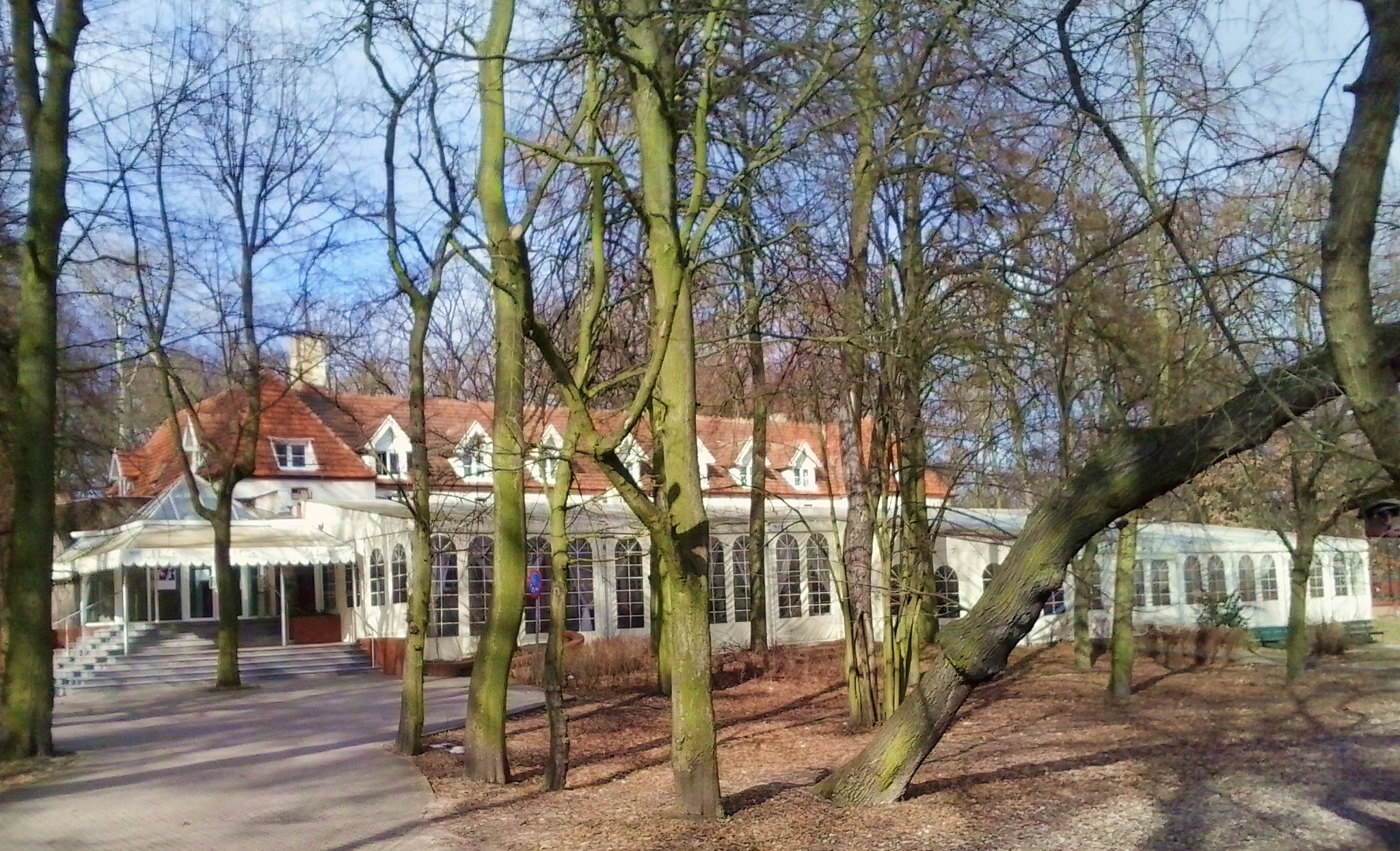 Poznań - restauracja w Parku Sołackim.